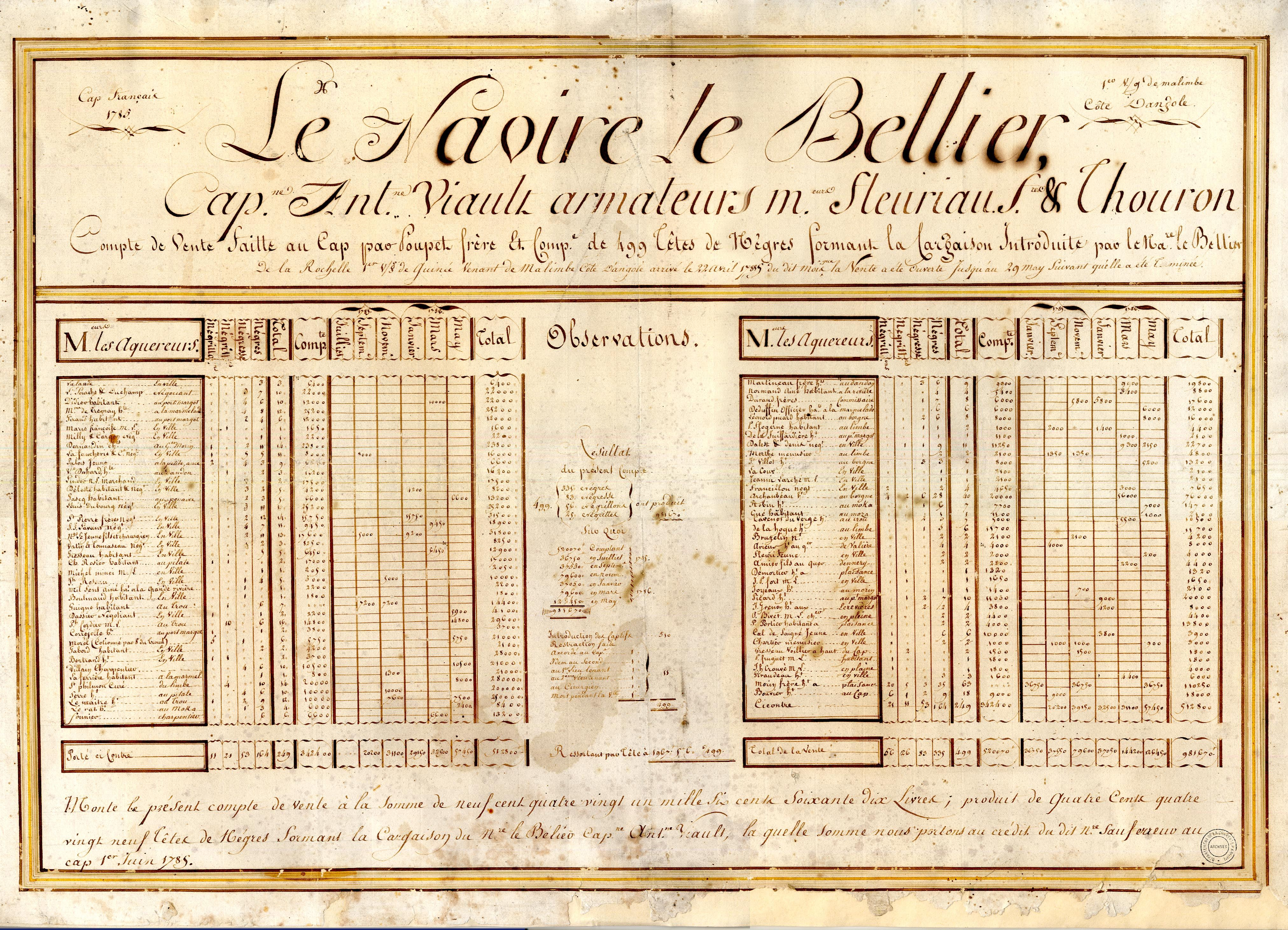 Arch. dép. Char.-Mar. 245 J fonds Magué-Margotteau